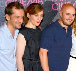 Nicolas Charlet, Valérie Donzelli et Bruno Lavaine à l'avant-première du film "Le Grand méchant loup".